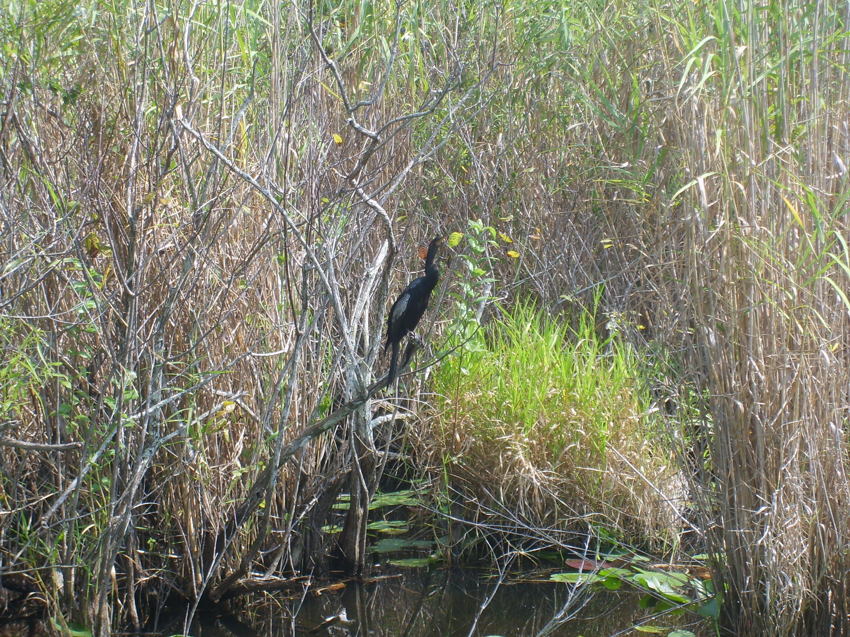 anhinga